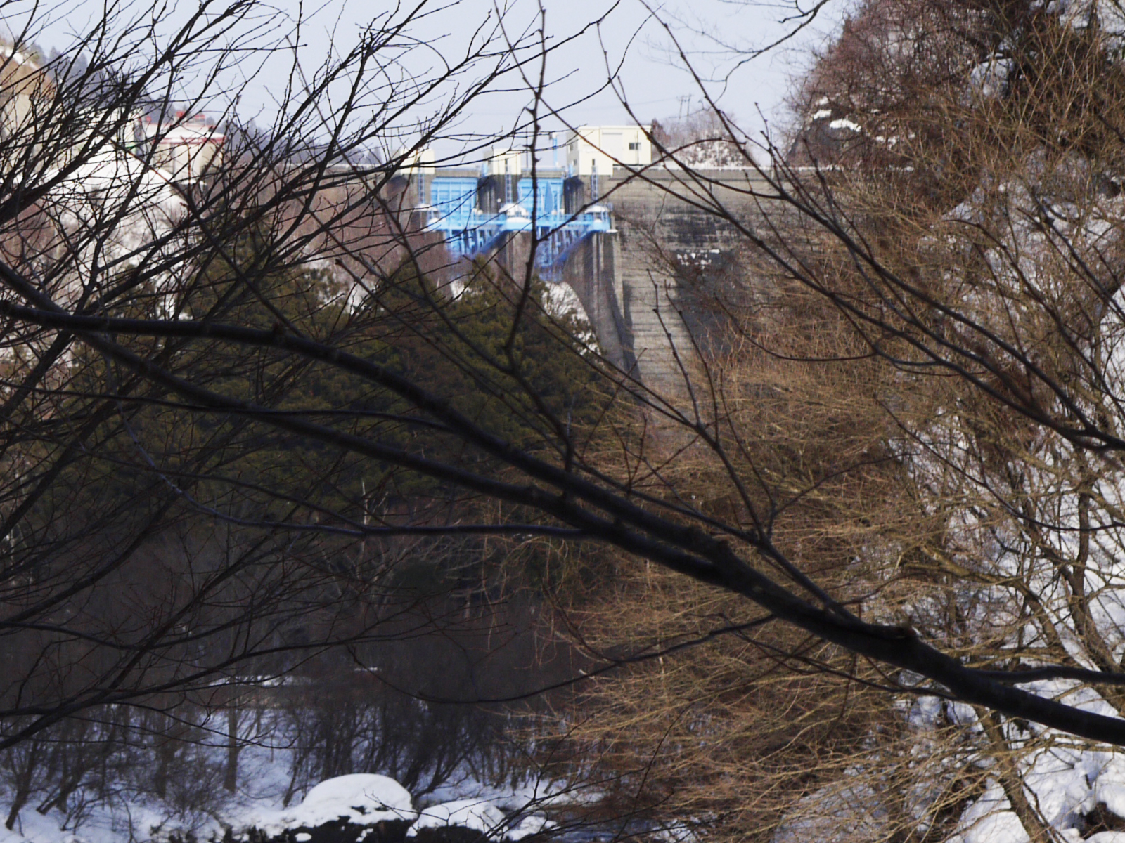 素波里ダム